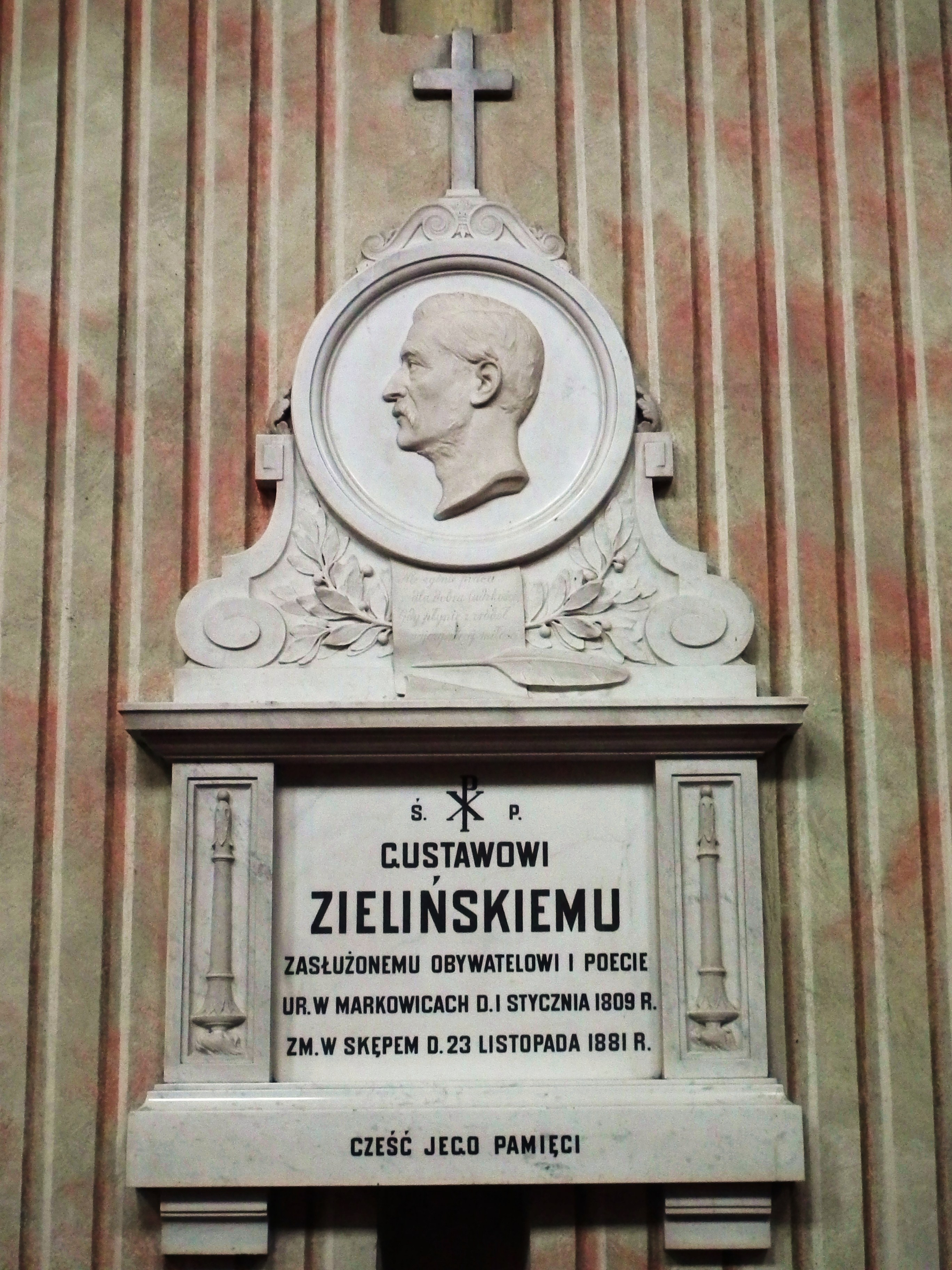 Tablica Gustawa Zielińskiego w klasztorze w Skępem.